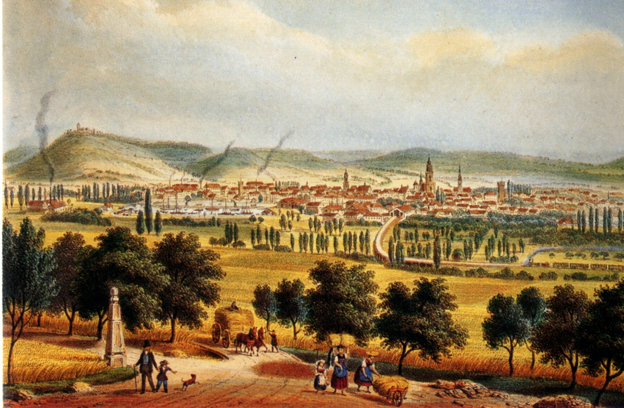 Eisenbahnknotenpunkt Heilbronn 1855. Kolorierte Lithographie 1855 von Eberhard Emminger, Johannes Läpple